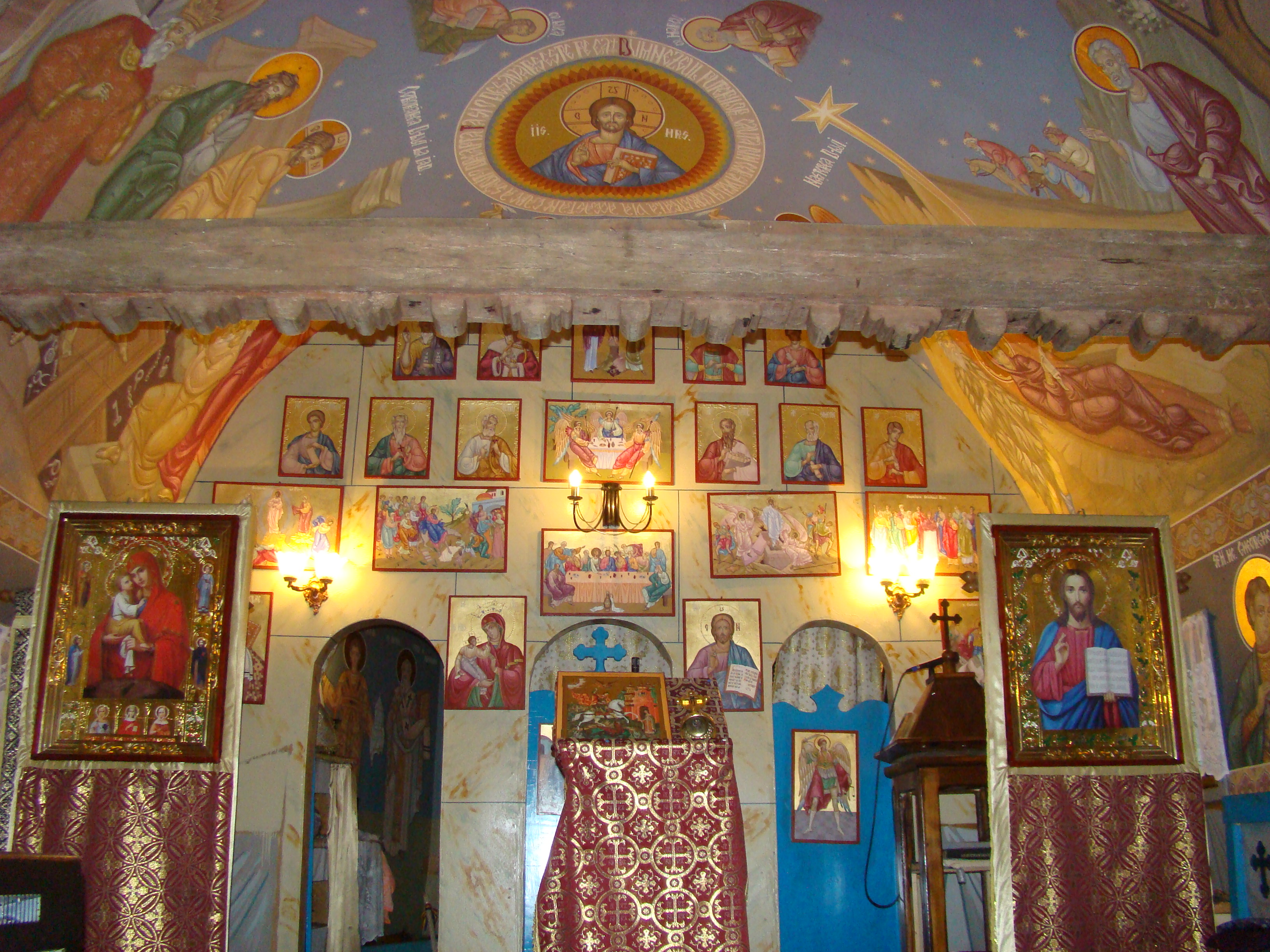 Biserica de lemn „Sf. Teodor Tiron" din Brătești, județul Bihor